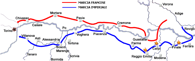 La marcia degli eserciti francese ed imperiale dal Veneto a Torino, rielaborata